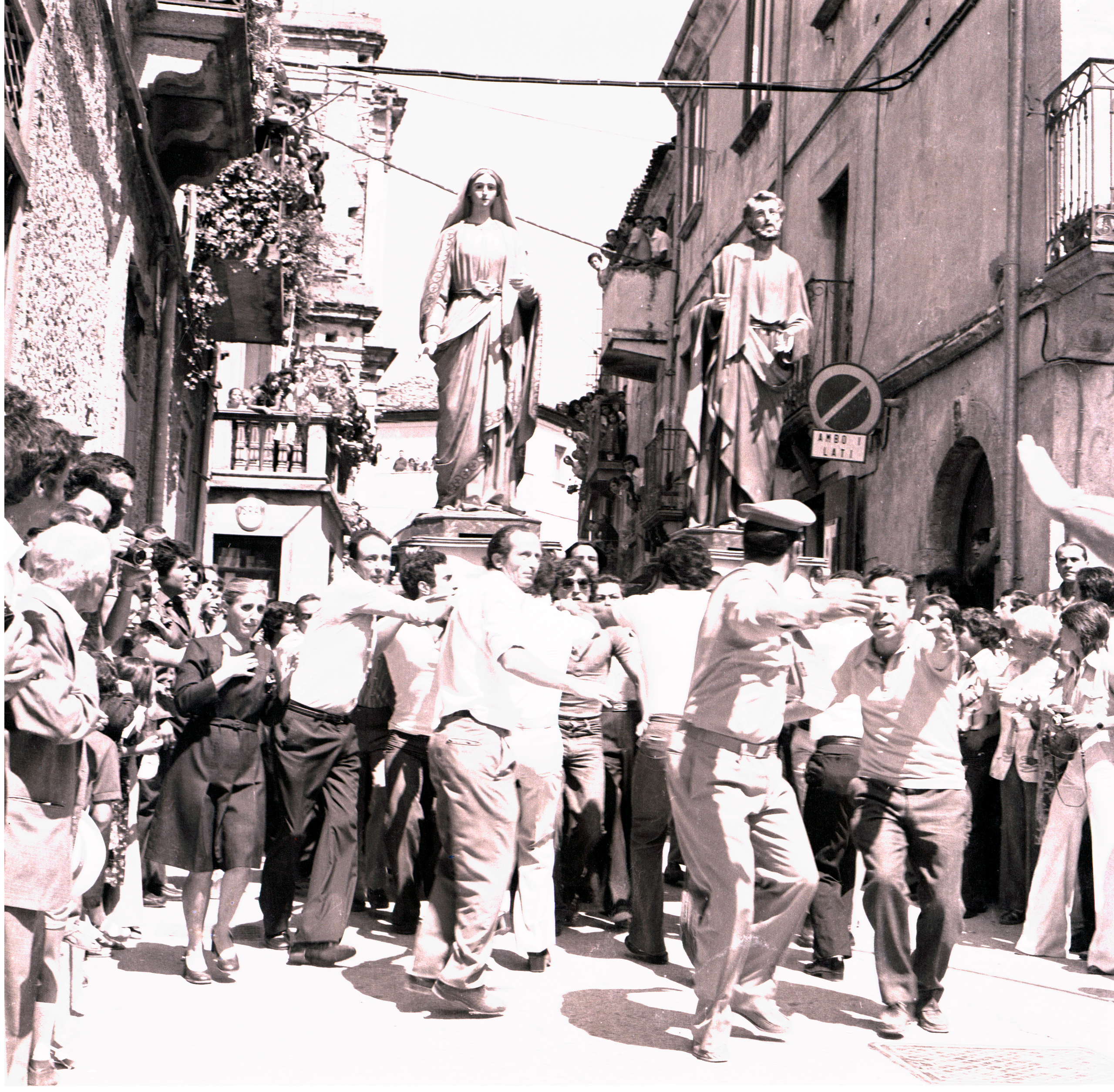 Festa Santo salvatore bianco e nero